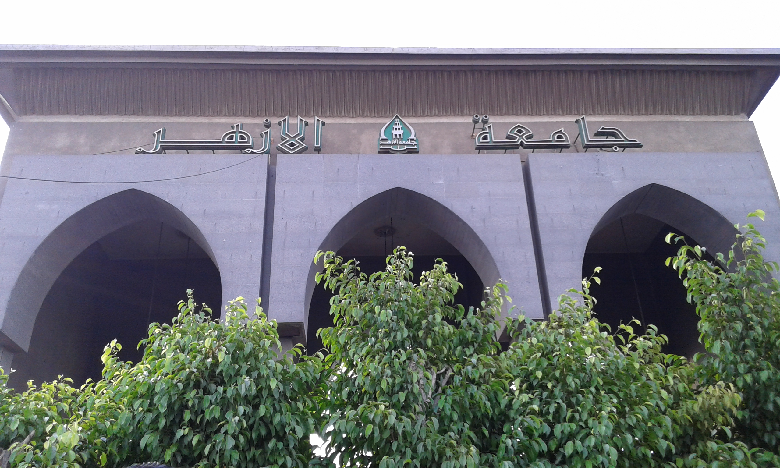 بوابة جامعة الأزهر فرع مدينة نصر بالقاهرة